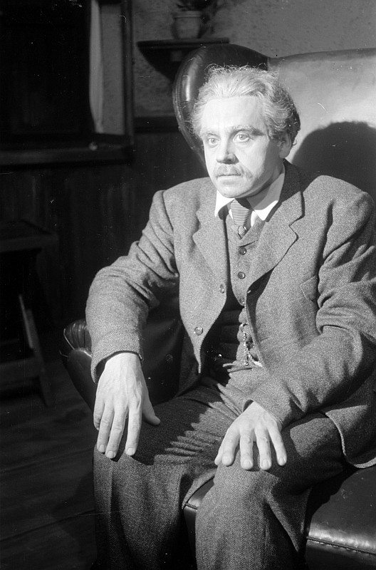 Original image description from the Deutsche Fotothek Szenenbilder mit Ruth Schilling, Max Eckard und Walter Richter